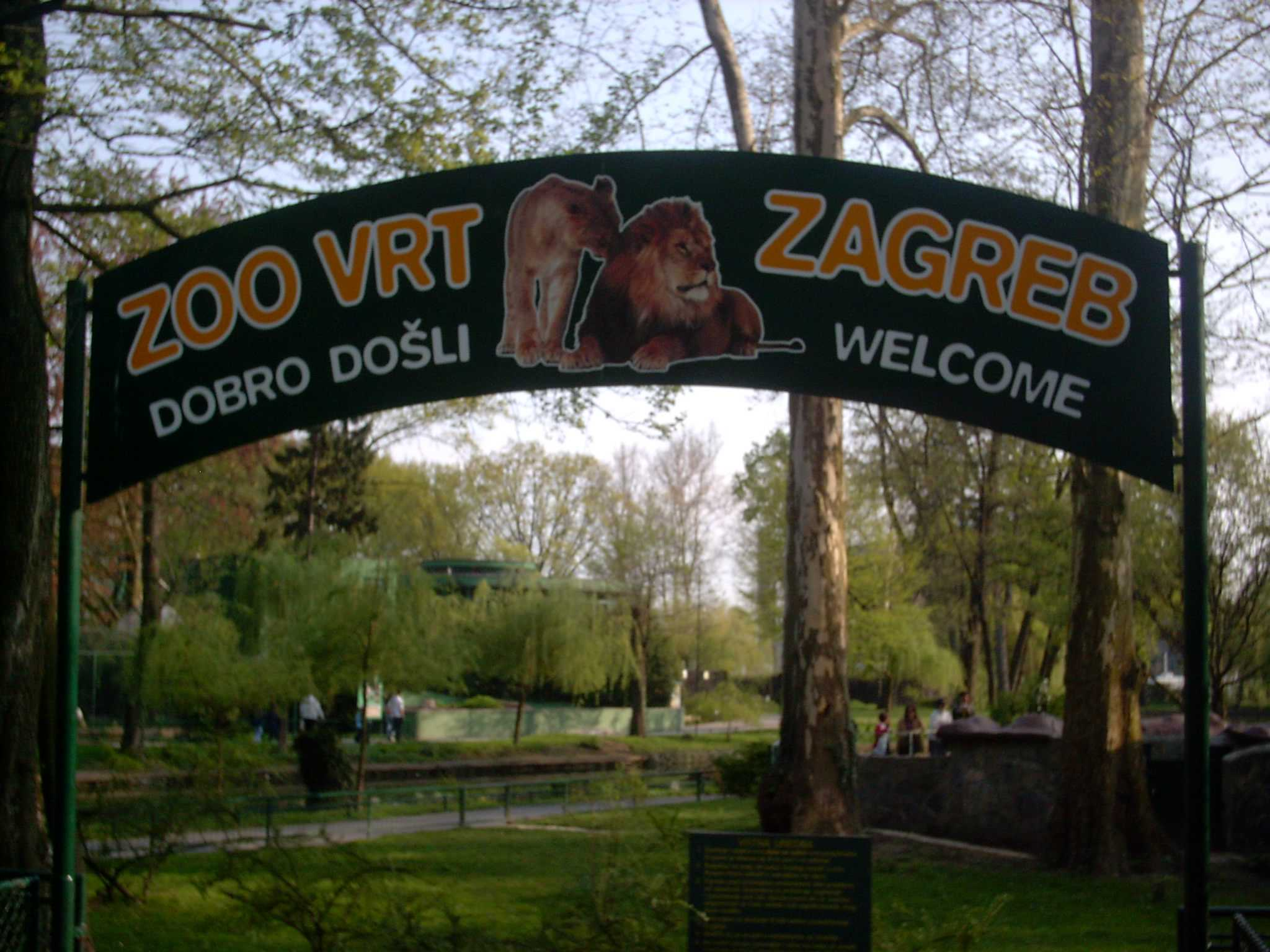 Zoo Zagreb